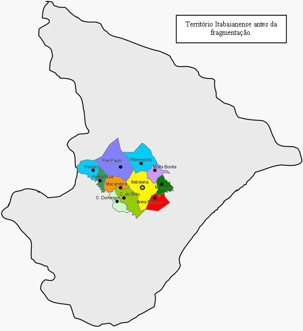 Território Itabaianense antes da fragmentação.